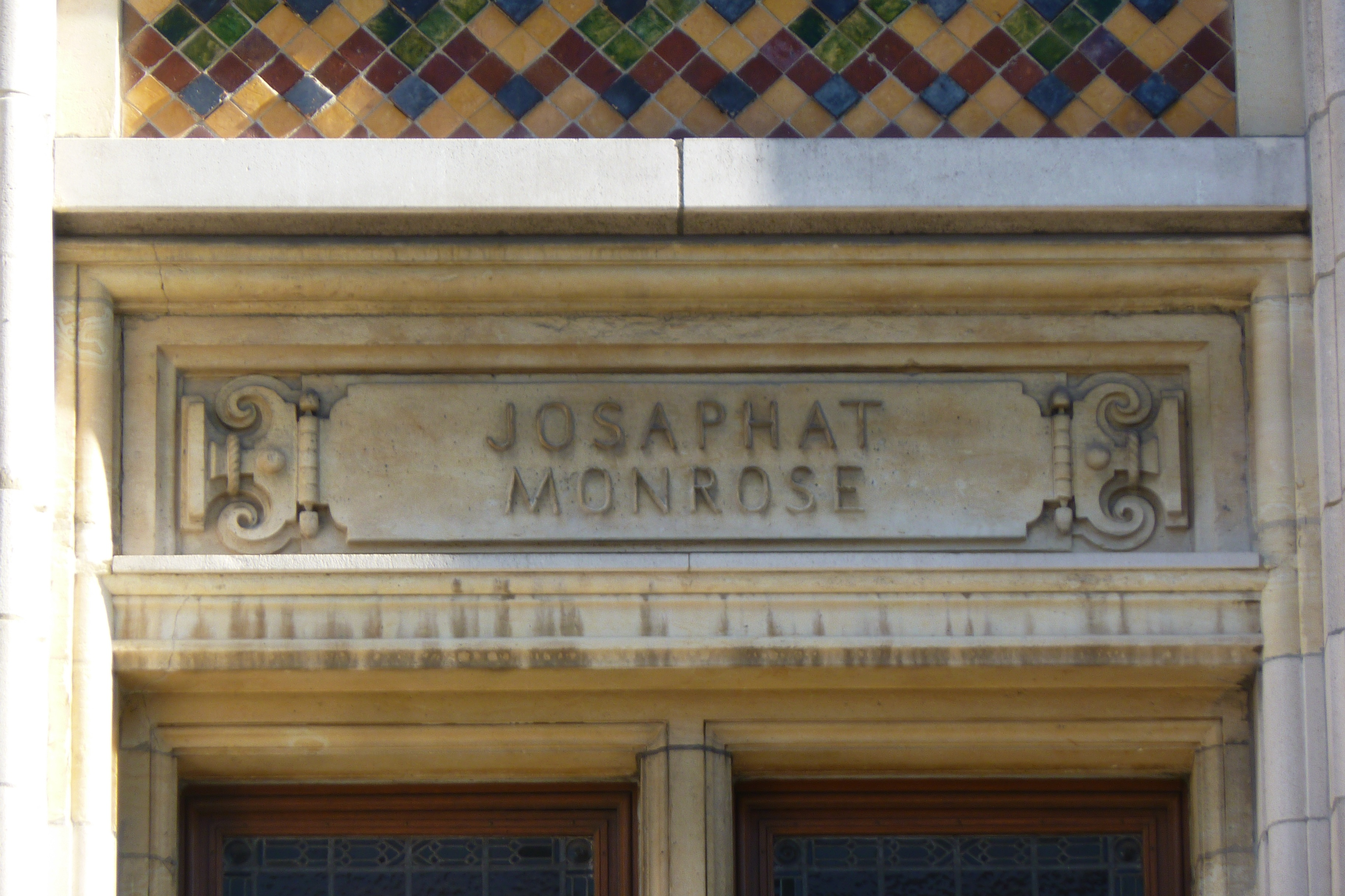 La façade de l'hôtel communal de Schaerbeek.